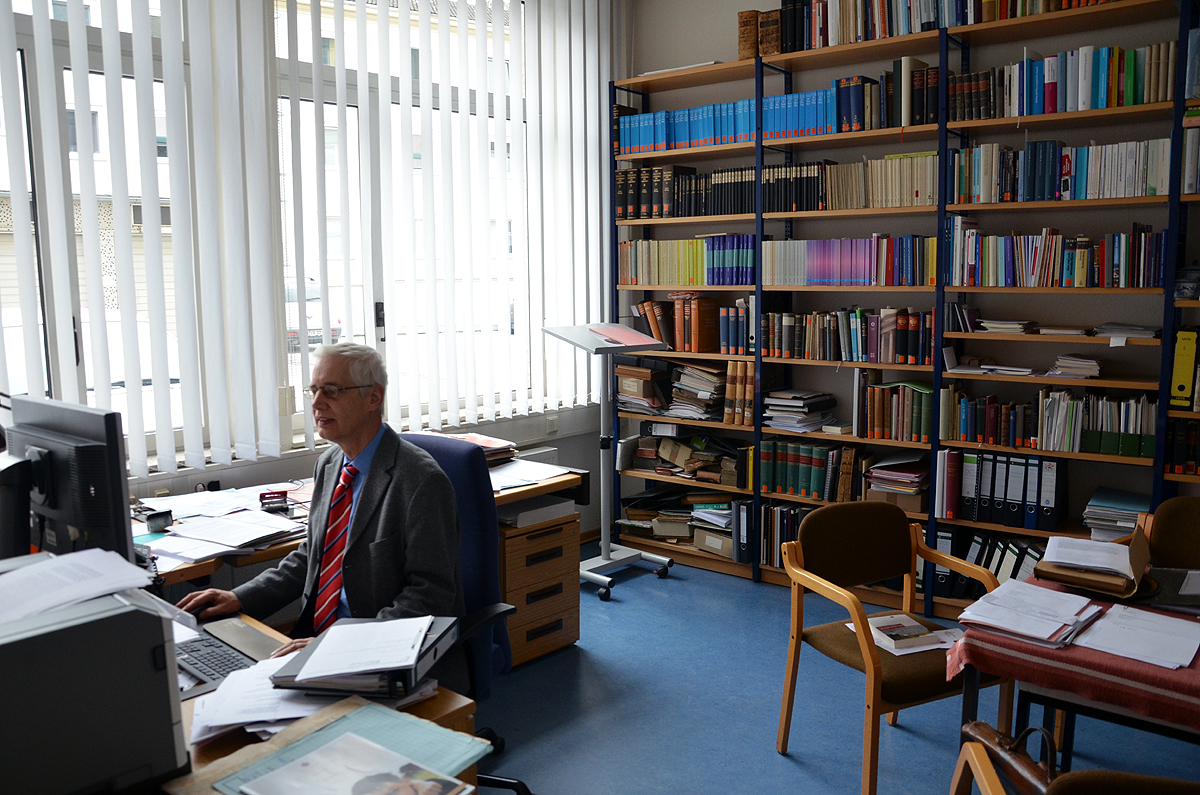 Der Theologe, Archivar, Herausgeber und Apl. Prof. Dr. Hans Otte; hier am Computer in seinem Büro im Landeskirchlichen Archiv der Evangelisch-lutherischen Landeskirche Hannovers ...